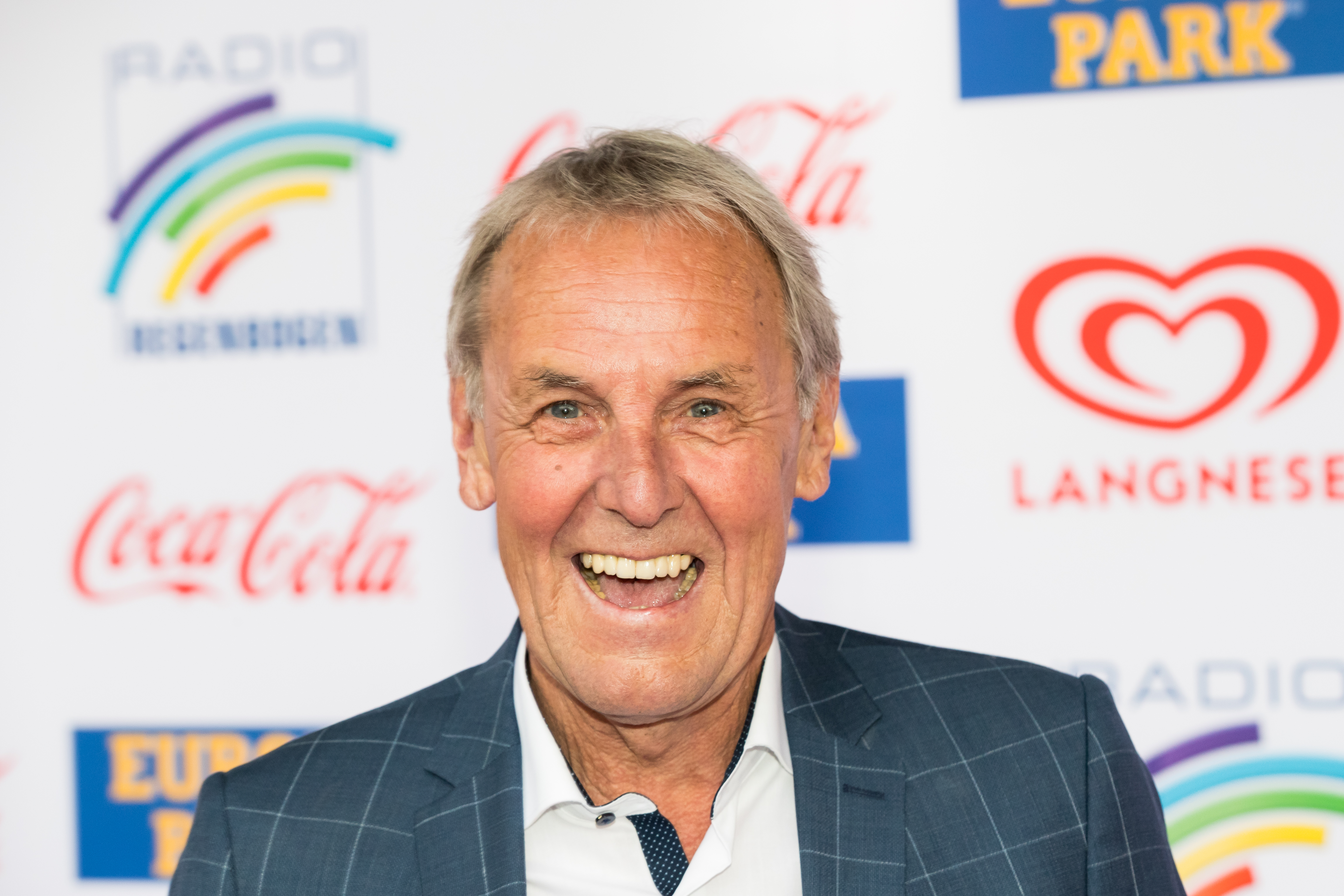 Jörg Wontorra during Radio Regenbogen Award 2019 at Europapark, Rust, Baden-Württemberg, Germany on 2019-04-12, Photo: Sven Mandel